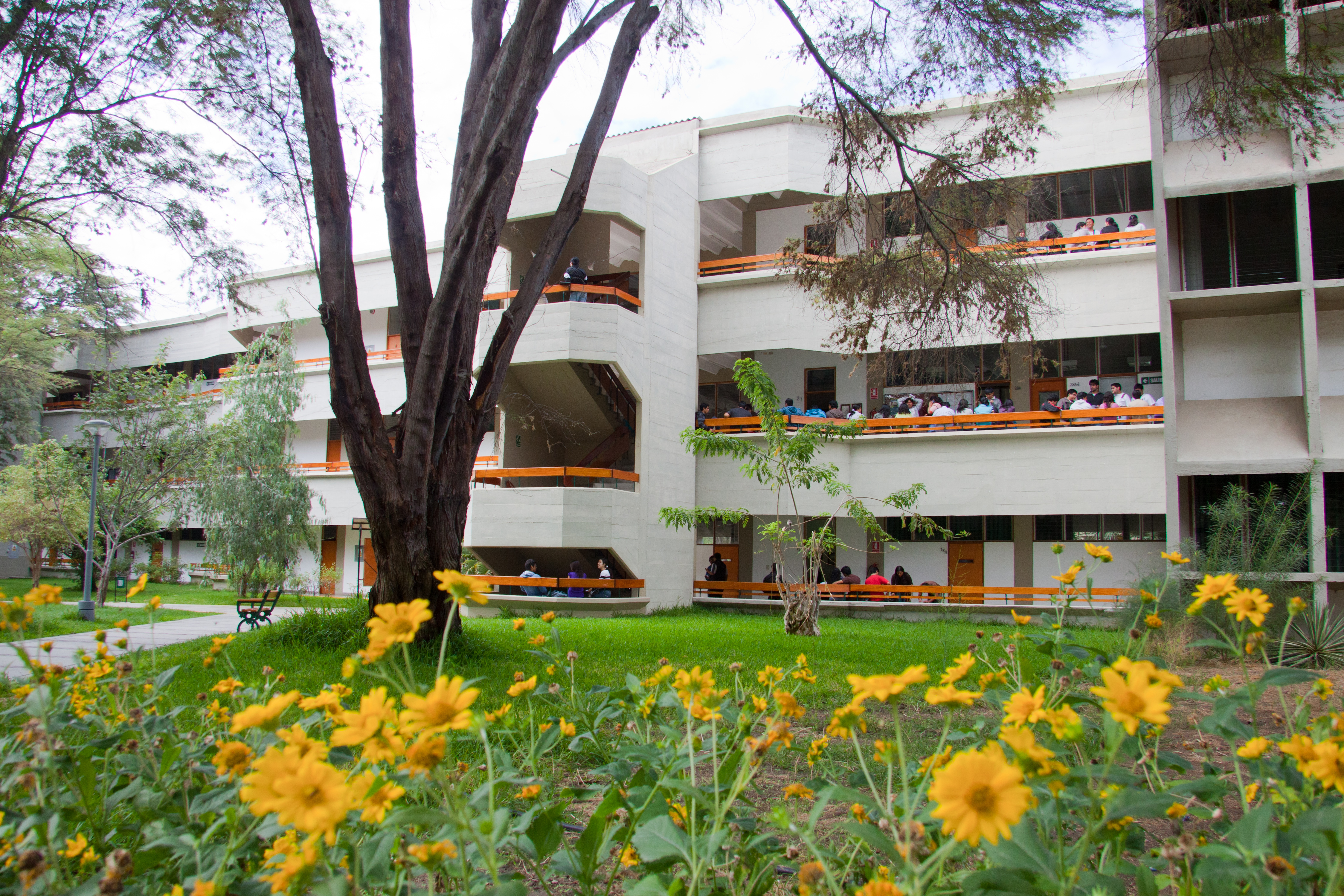 También llamado Edificio 80 - Universidad de Piura - UDEP